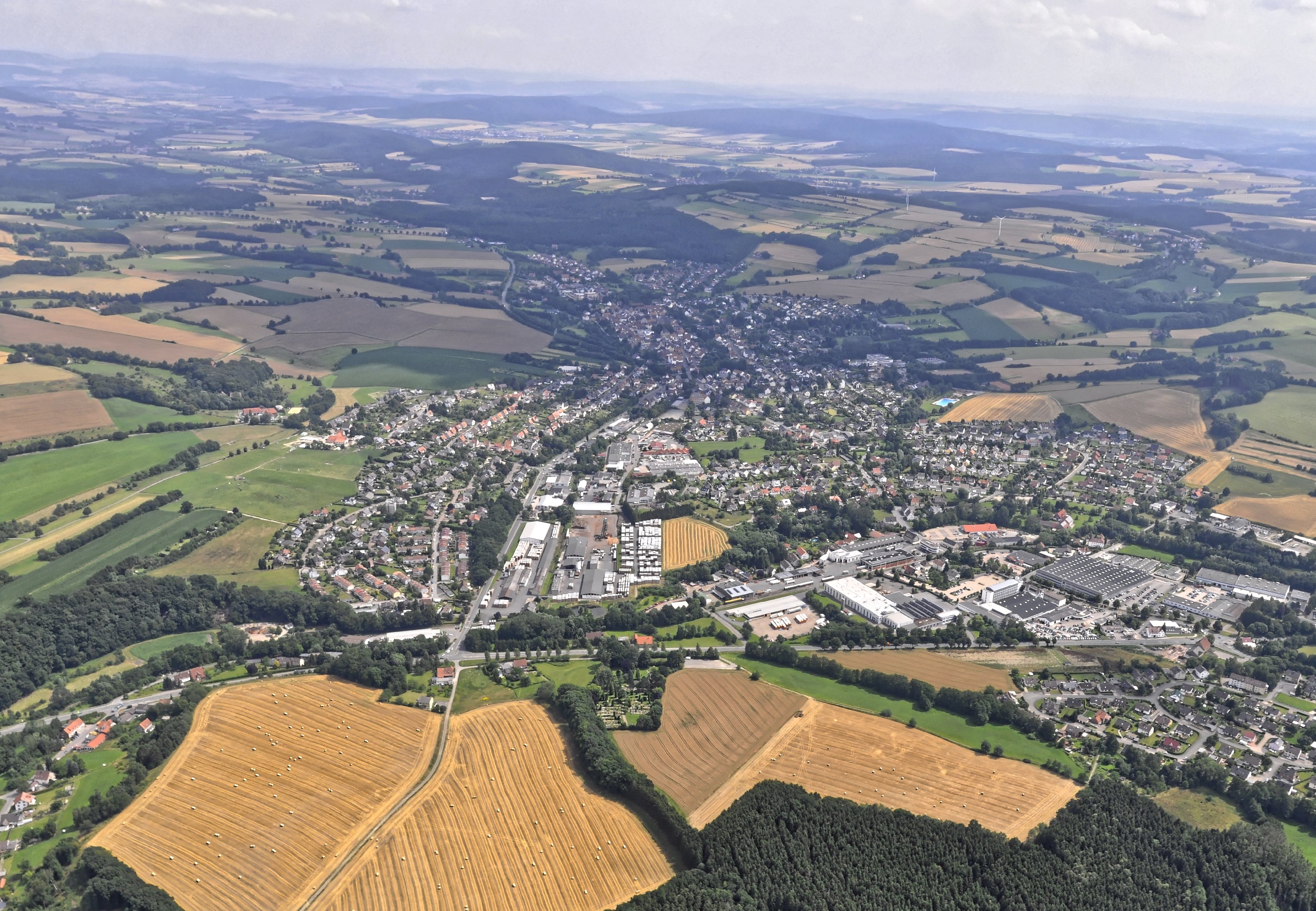 Bilder vom Flug Nordholz-Hammelburg 2015: Bösingfeld